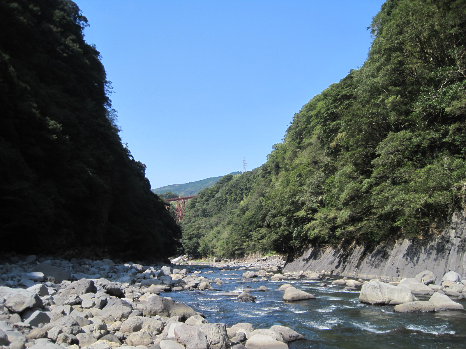 立野ダム本体予定地（立野峡谷）を上流から見た写真2012年10月7日